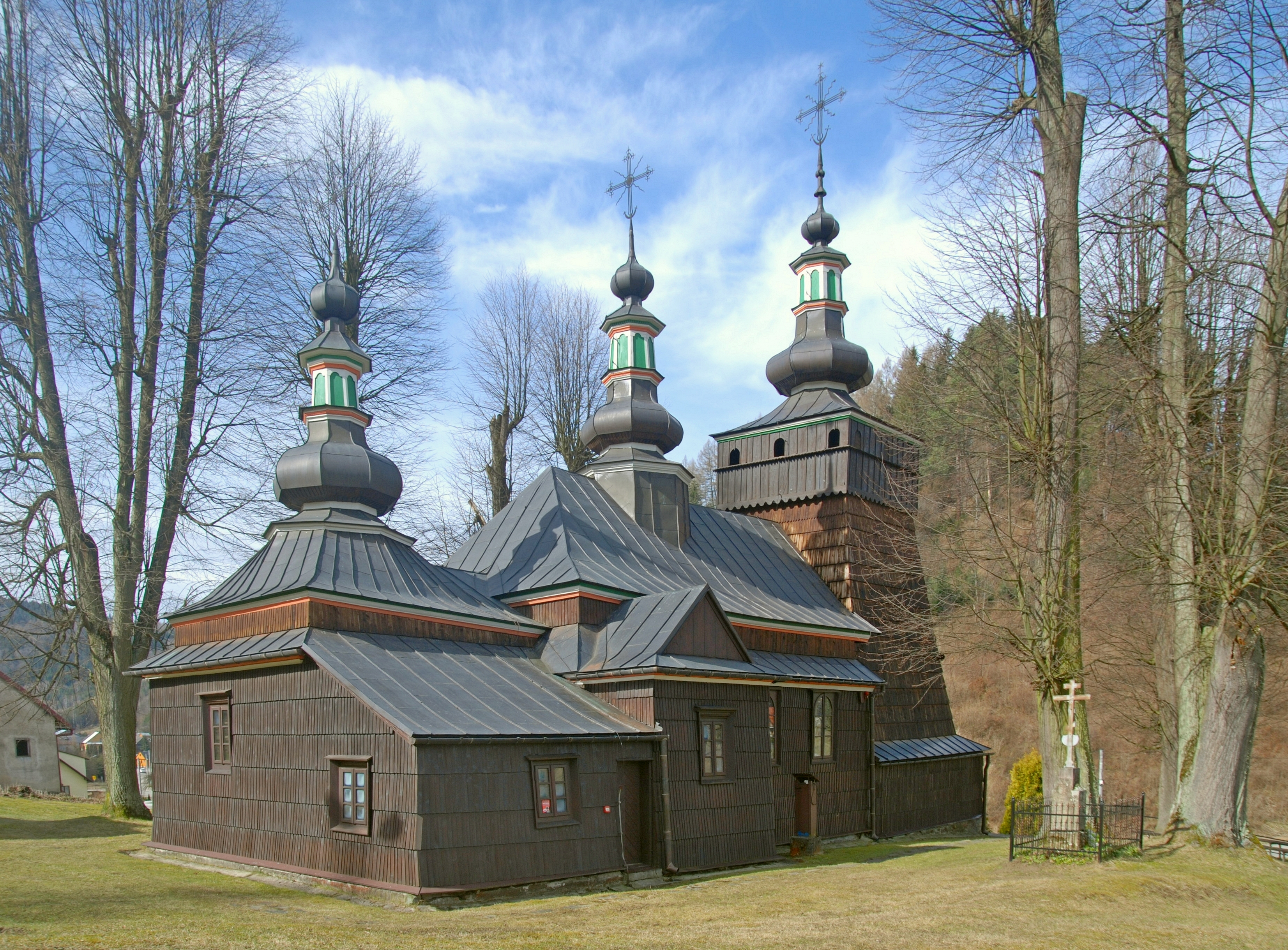 wieś Milik